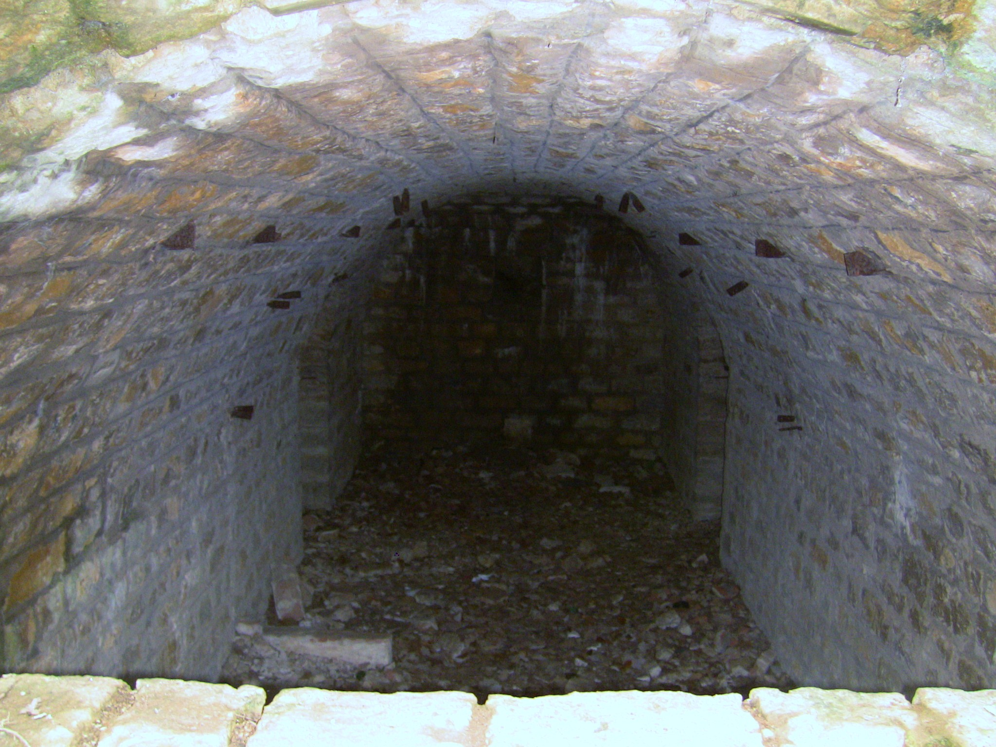 L'intérieur de la traverse-abri III de la batterie ouest du fort de pLanoise, à Besançon (Doubs, France).